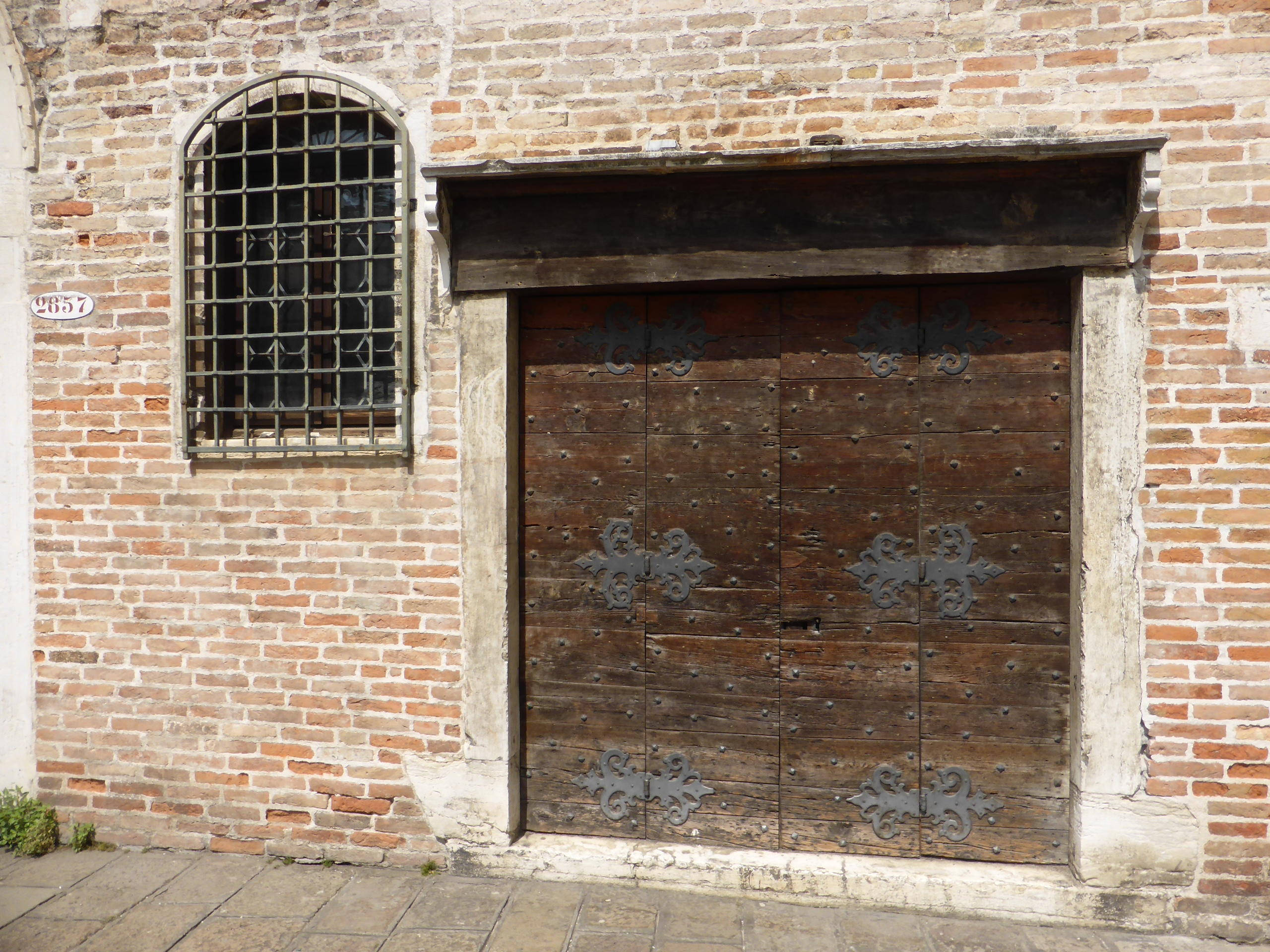 Scoletta dei Caligheri, Laden im Erdgeschoss